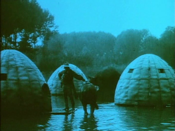 Description